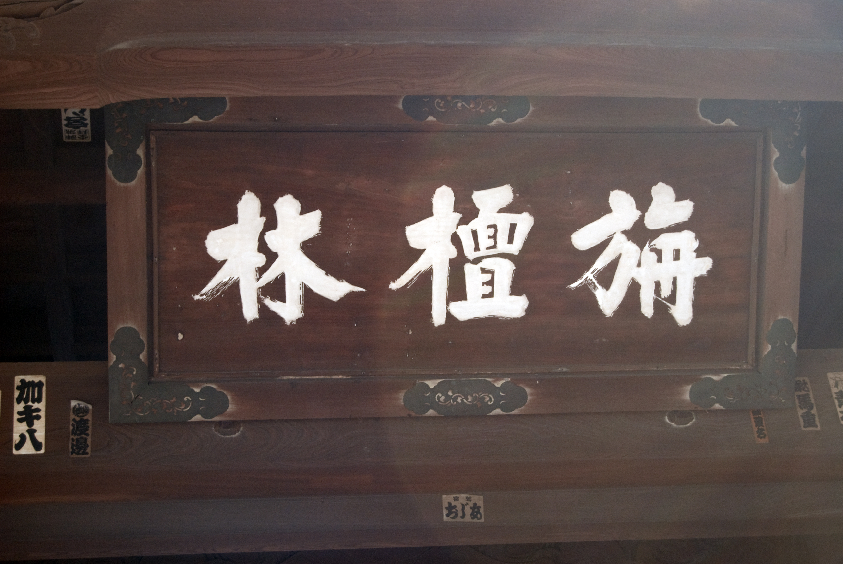 吉祥寺 (文京区)の門額。「旃檀林」